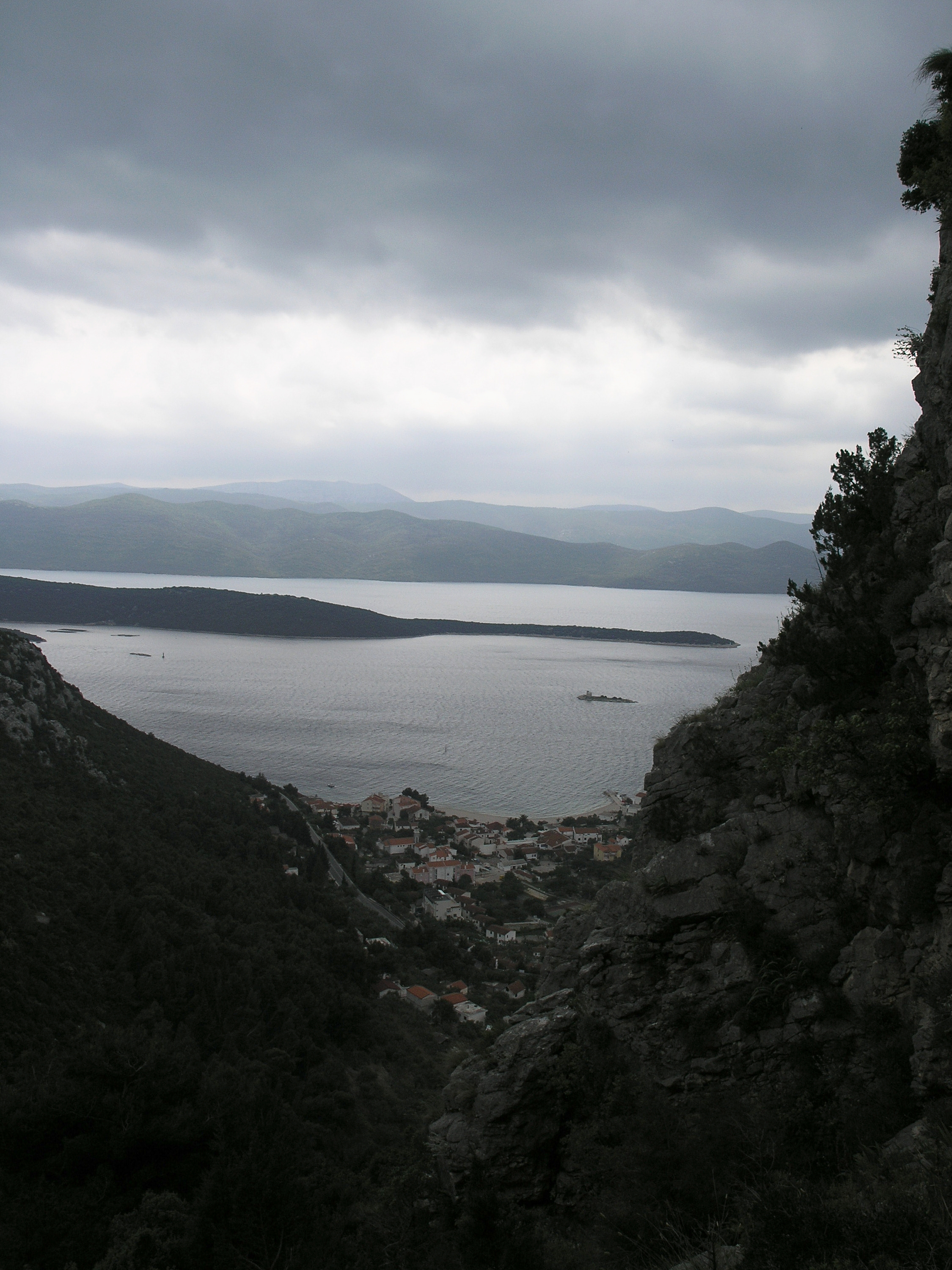 Přístavní město Klek a severozápadní část stejnojmenného poloostrova od zříceniny Smrđan Grad